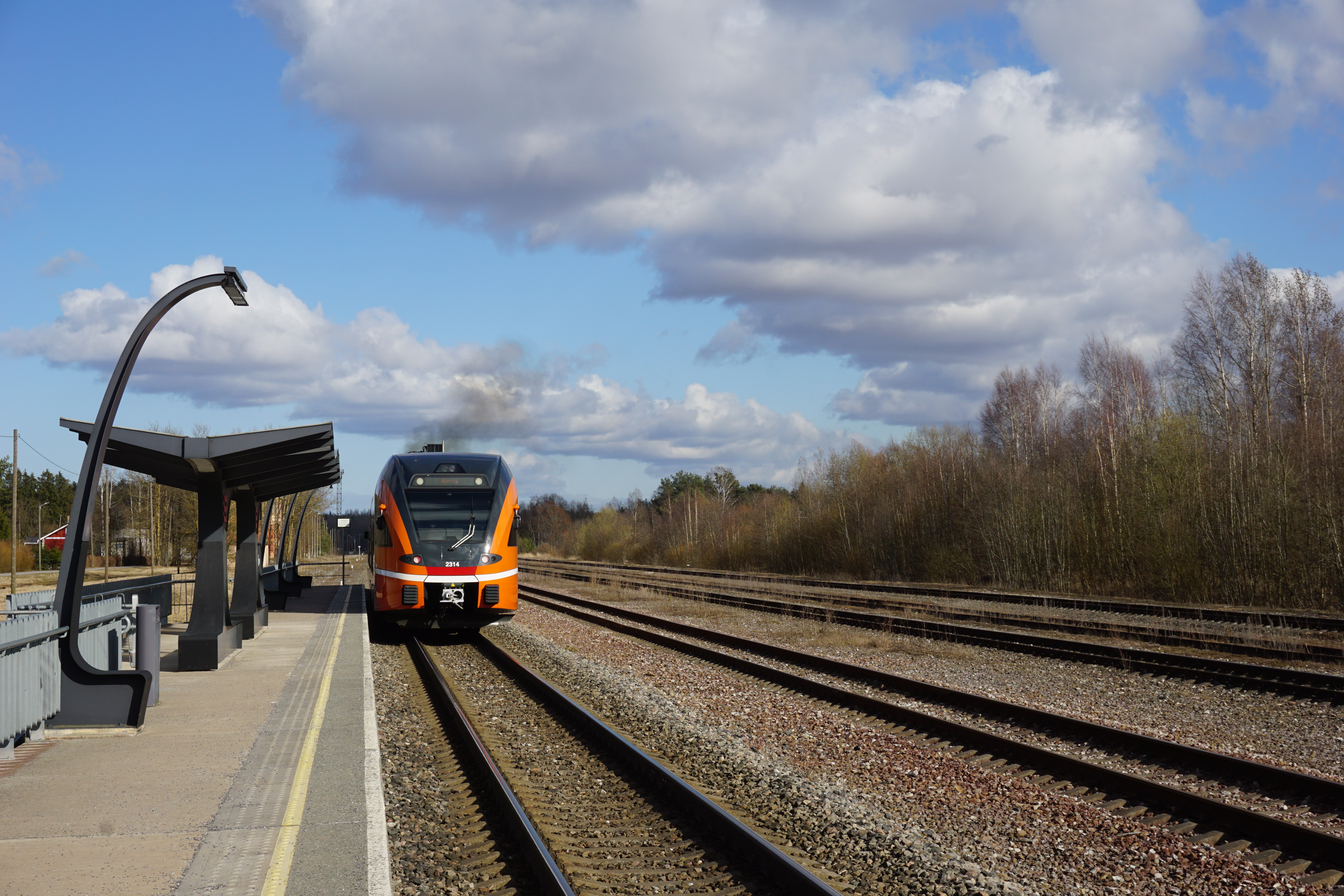 Elroni reisirong Stadler FLIRT Püssi raudteejaamas